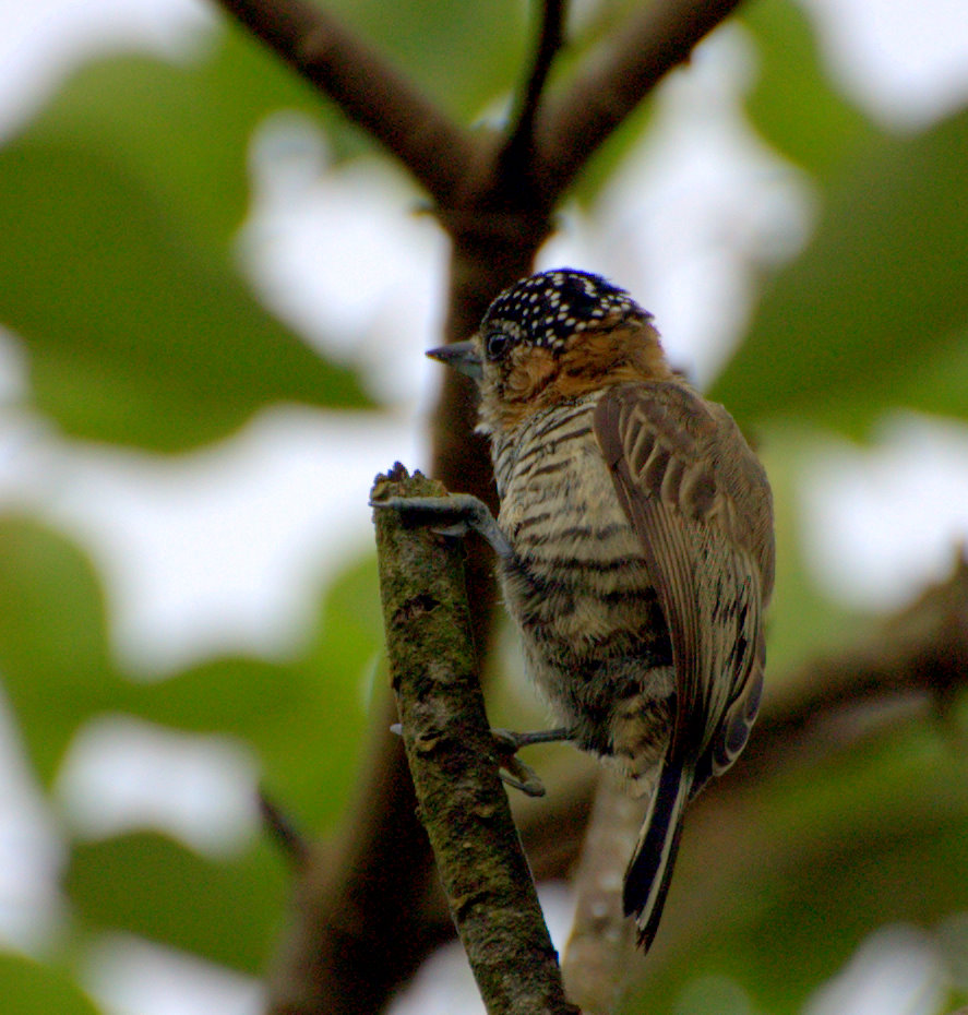 No quintal da casa da minha sogra na cidade de Registro-SP